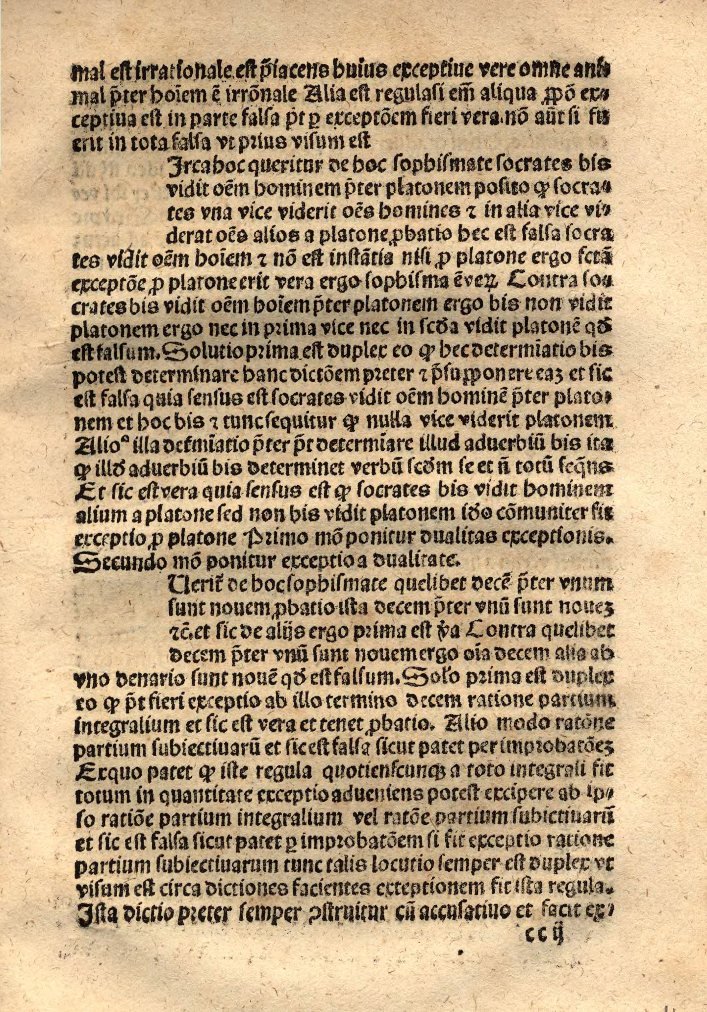 Jan z Głogowa (ok. 1445-1507). Exercitium super omnes tractatus .... Europeana. Retrieved on 2015-09-26.